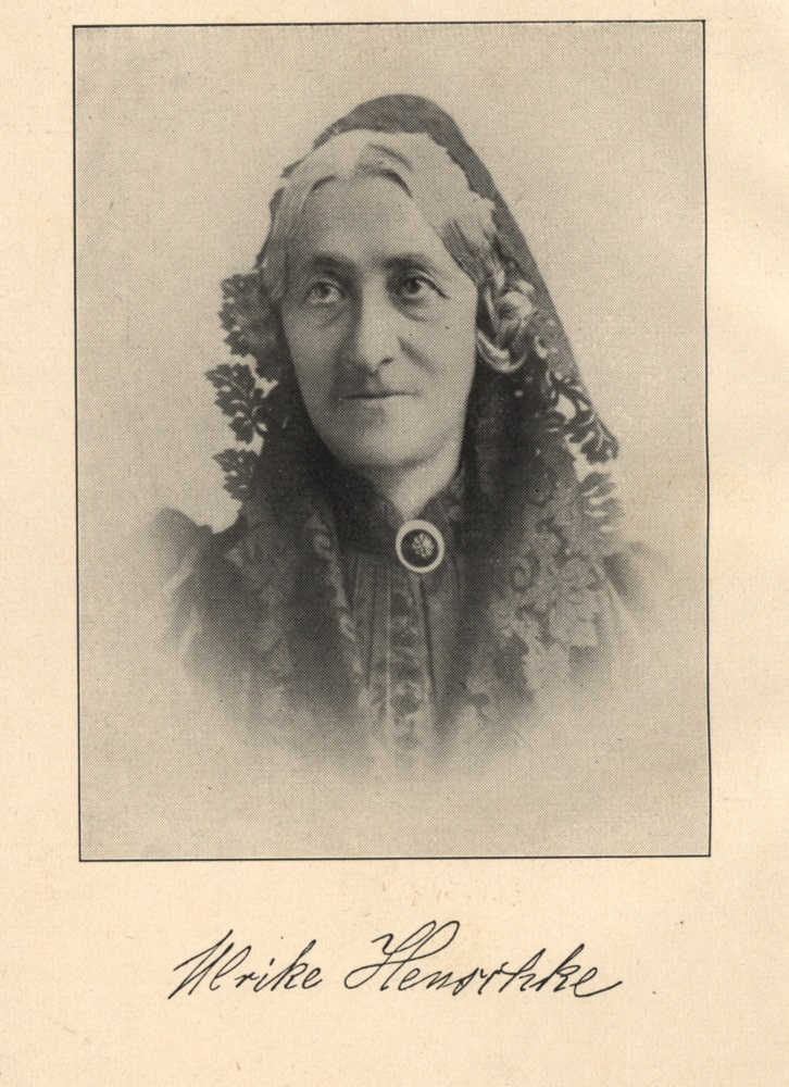 Frontispiz aus dem Buch "Ulrike Henschke" von Margarete Henschke 1931